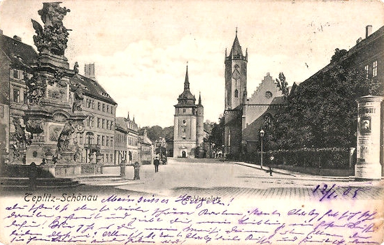 Historische Ansicht von Teplitz-Schönau von vor 1905: Pestsäule, Schlosskirche, Johanneskirche